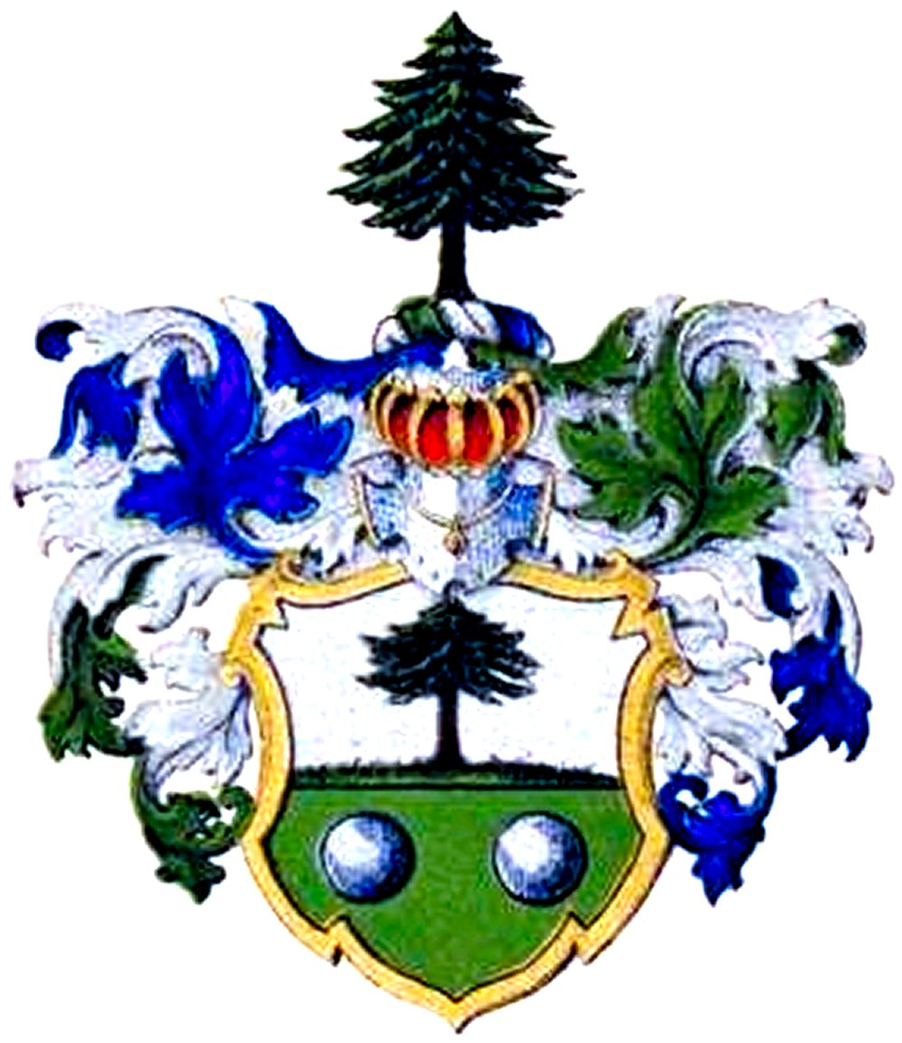 Focki suguvõsa aadlivapp